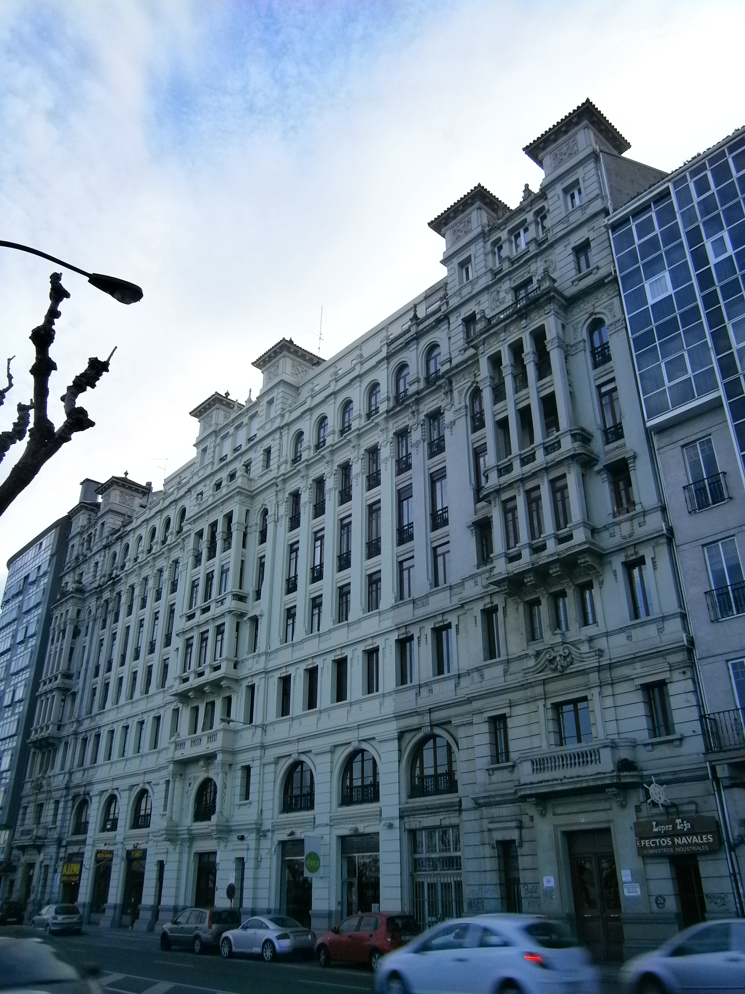 Casa Jesús Fernández, de Pedro Mariño, na Coruña